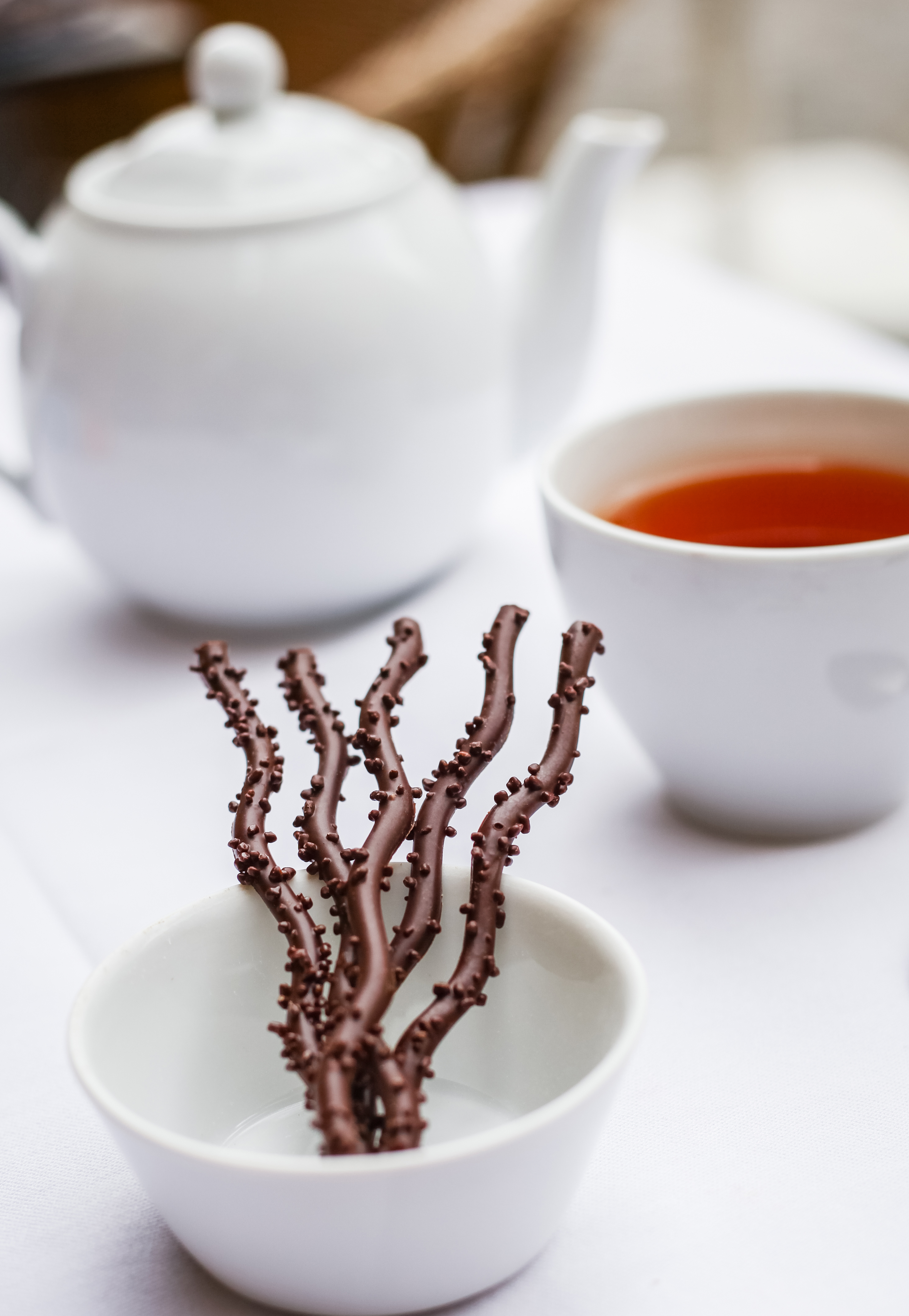 Les Sarments du Médoc de Mademoiselle de Margaux